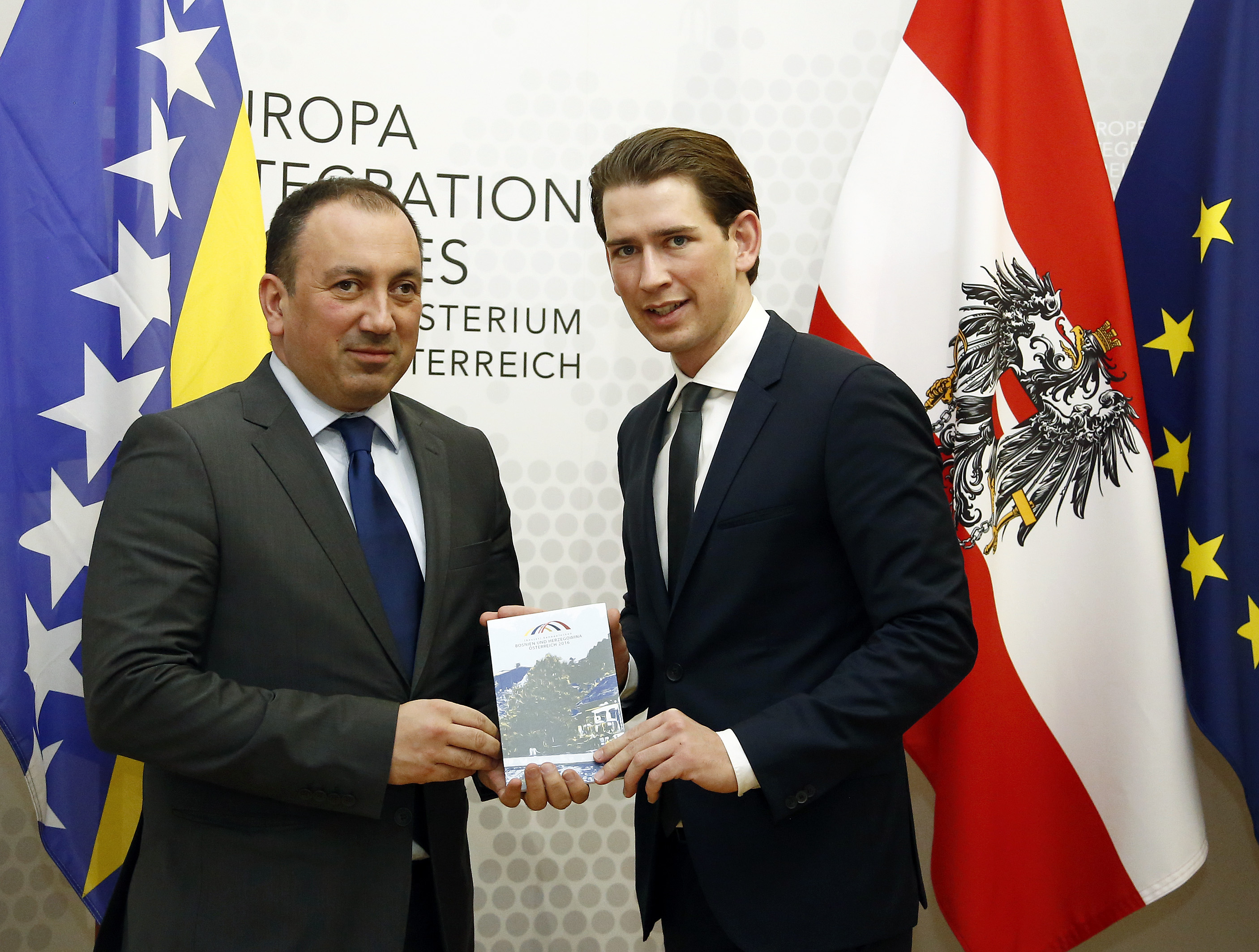 Bundesminister Sebastian Kurz trifft den Außenminister von Bosnien und Herzegovina, Igor Crnadak. Wien, 27.01.2016, Foto: Dragan Tatic